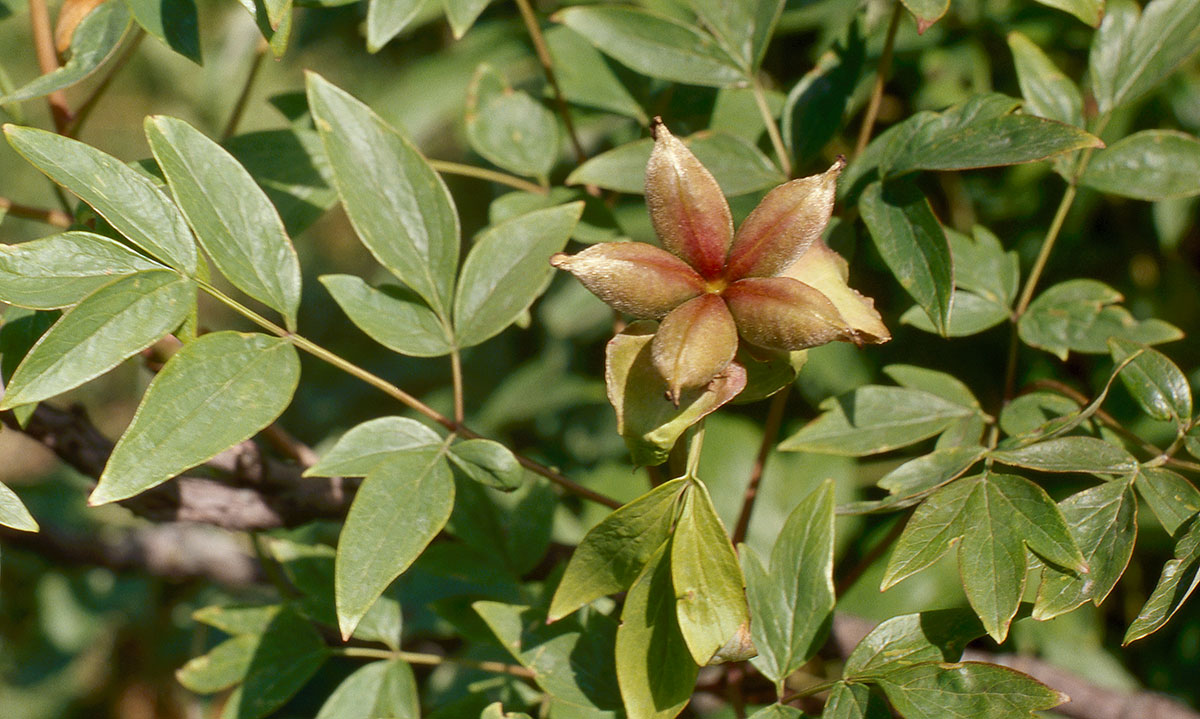 Paeonia suffruticosa, fruit. Kiev, Ukraine, national botanical garden